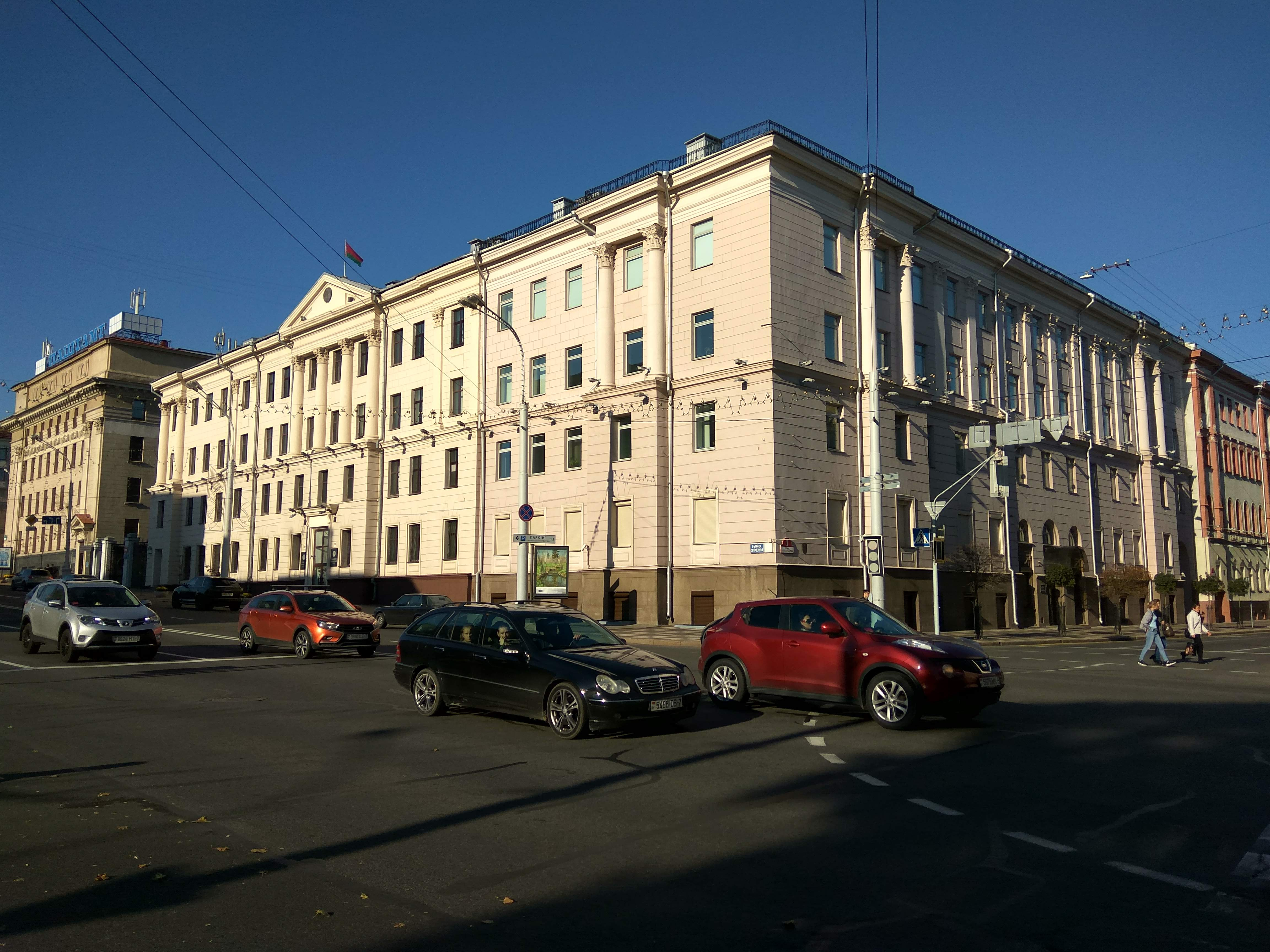 Мінск. Вуліца Карла Маркса (кастрычнік 2018)